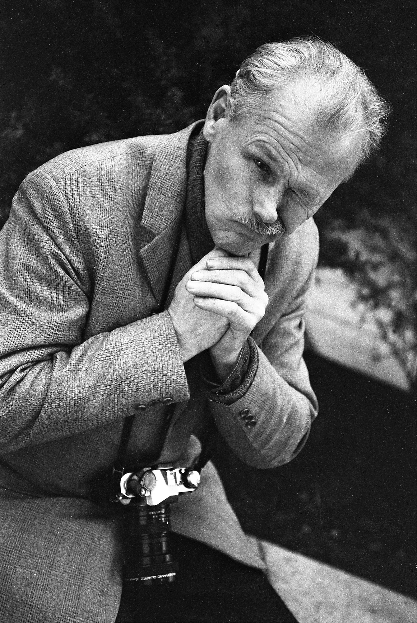 Kalju Suur, päevapiltnik 92